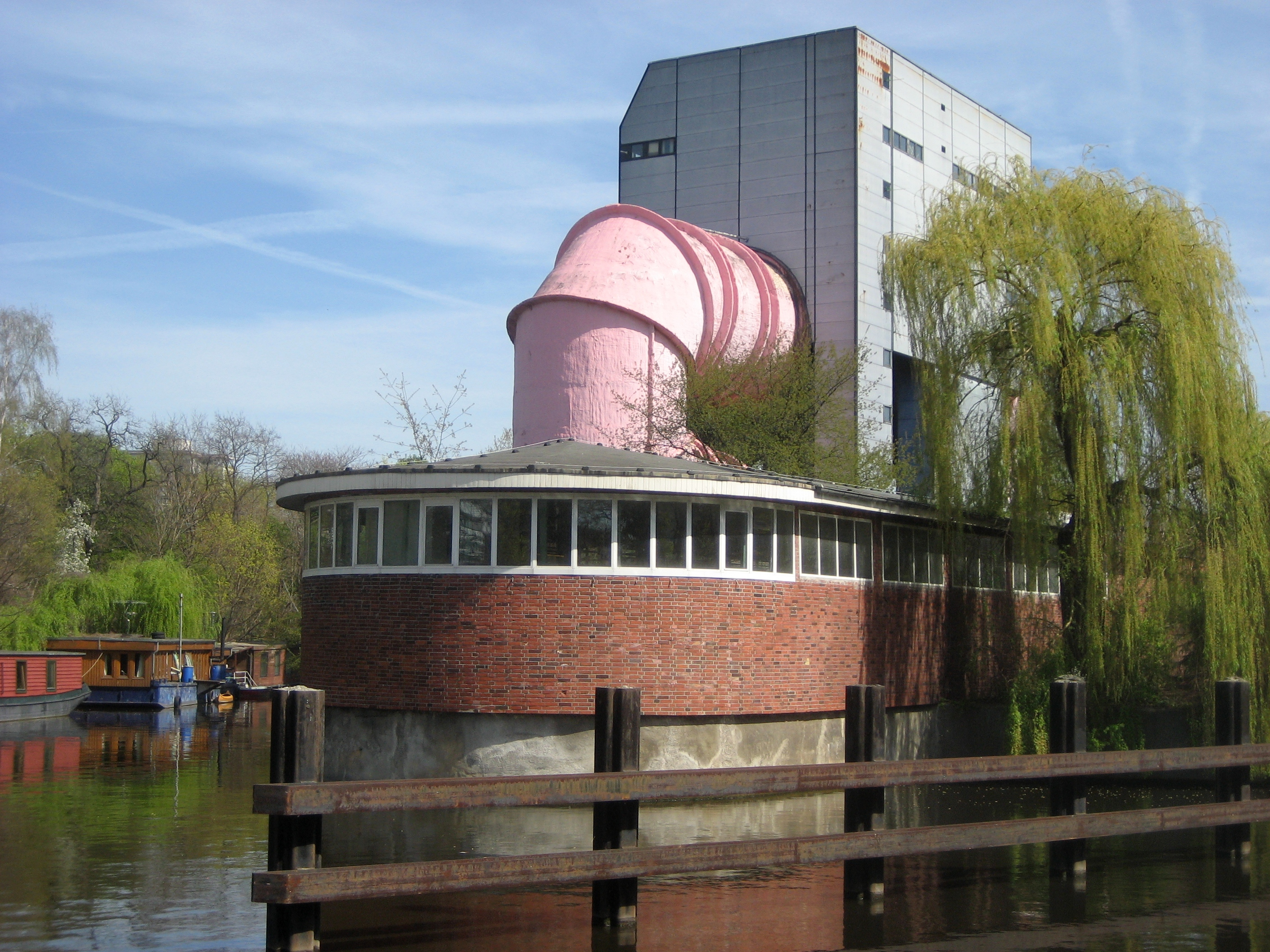 Versuchsanstalt für Wasserbau und Schiffahrt